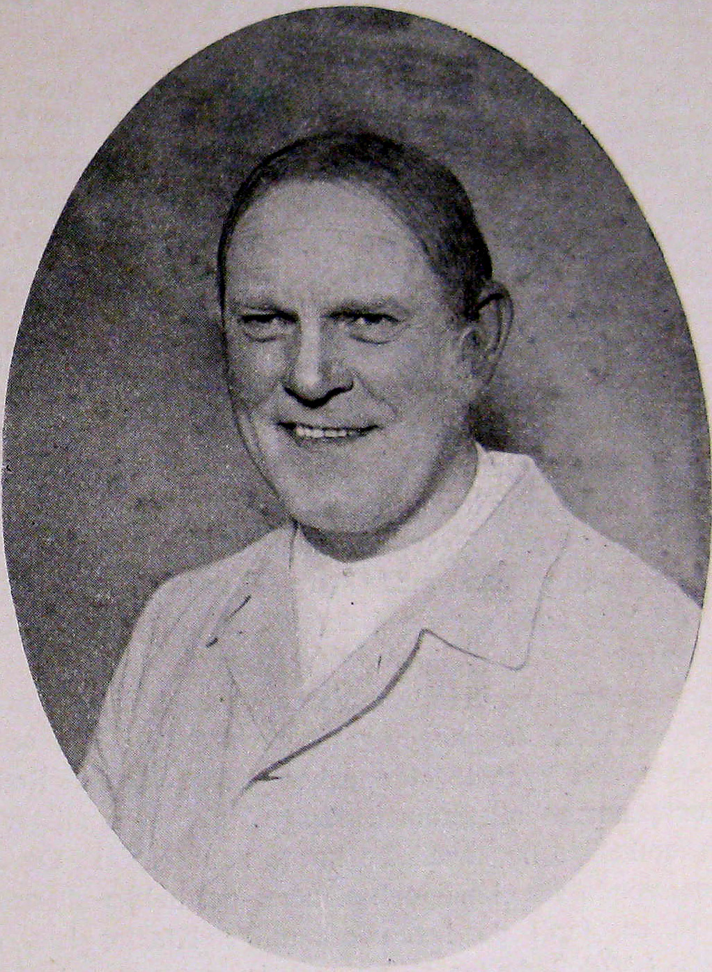 Frederik Jensen (25 June 1863 - 14 February 1934) was a Danish stage and film actor.